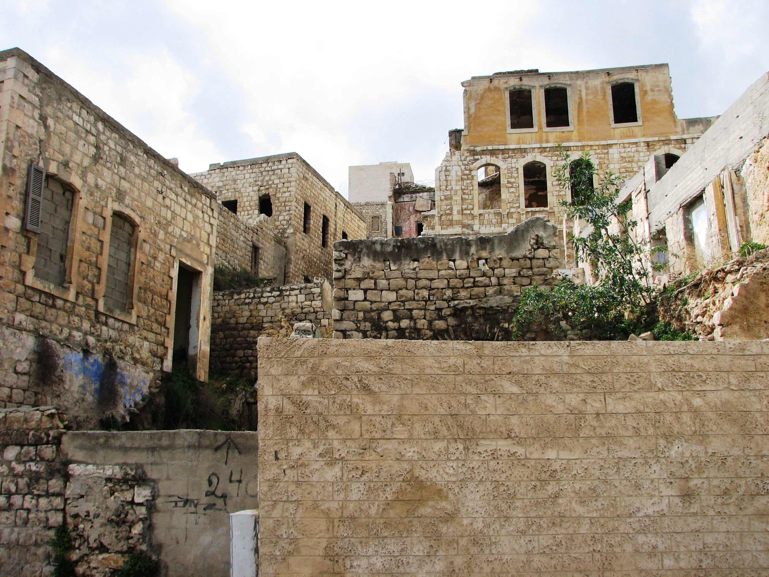 Wadi Salib in Downtown Haifa. ואדי סאליב היא שכונה ברובע העיר התחתית בחיפה. הוקמה בסוף המאה ה-19 על ידי ערבים שיצאו מחומות העיר העתיקה של חיפה. השכונה ננטשה אט אט. בתחילת המאה ה-21 החלה עיריית חיפה בפרויקט שיקום השכונה והפיכתו לרובע אמנים רחוב שיבת ציון. מבט לכיוון דרום